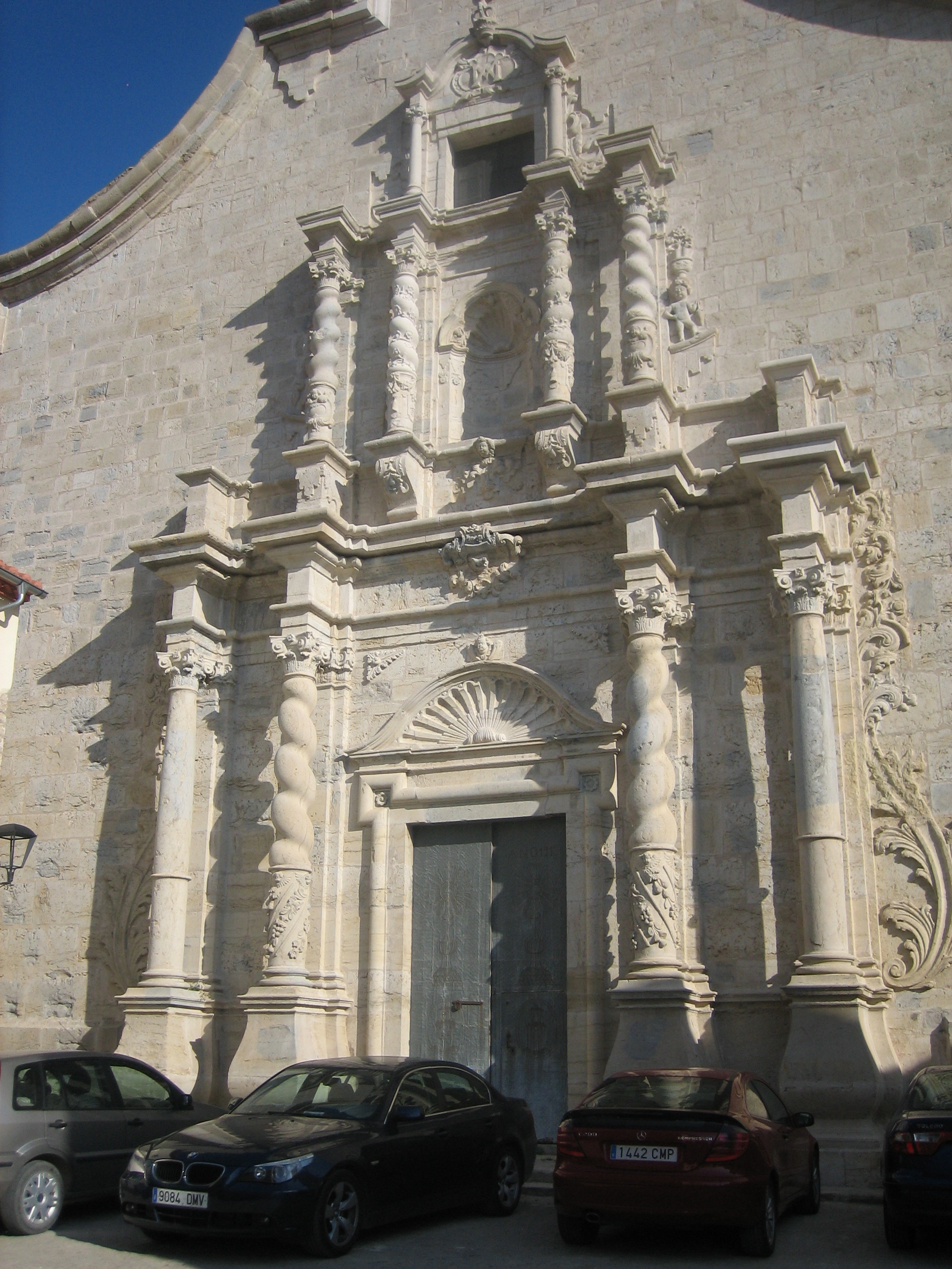 Portada principal de l'església de l'Assumpció d'Ares del Maestrat (Alt Maestrat)